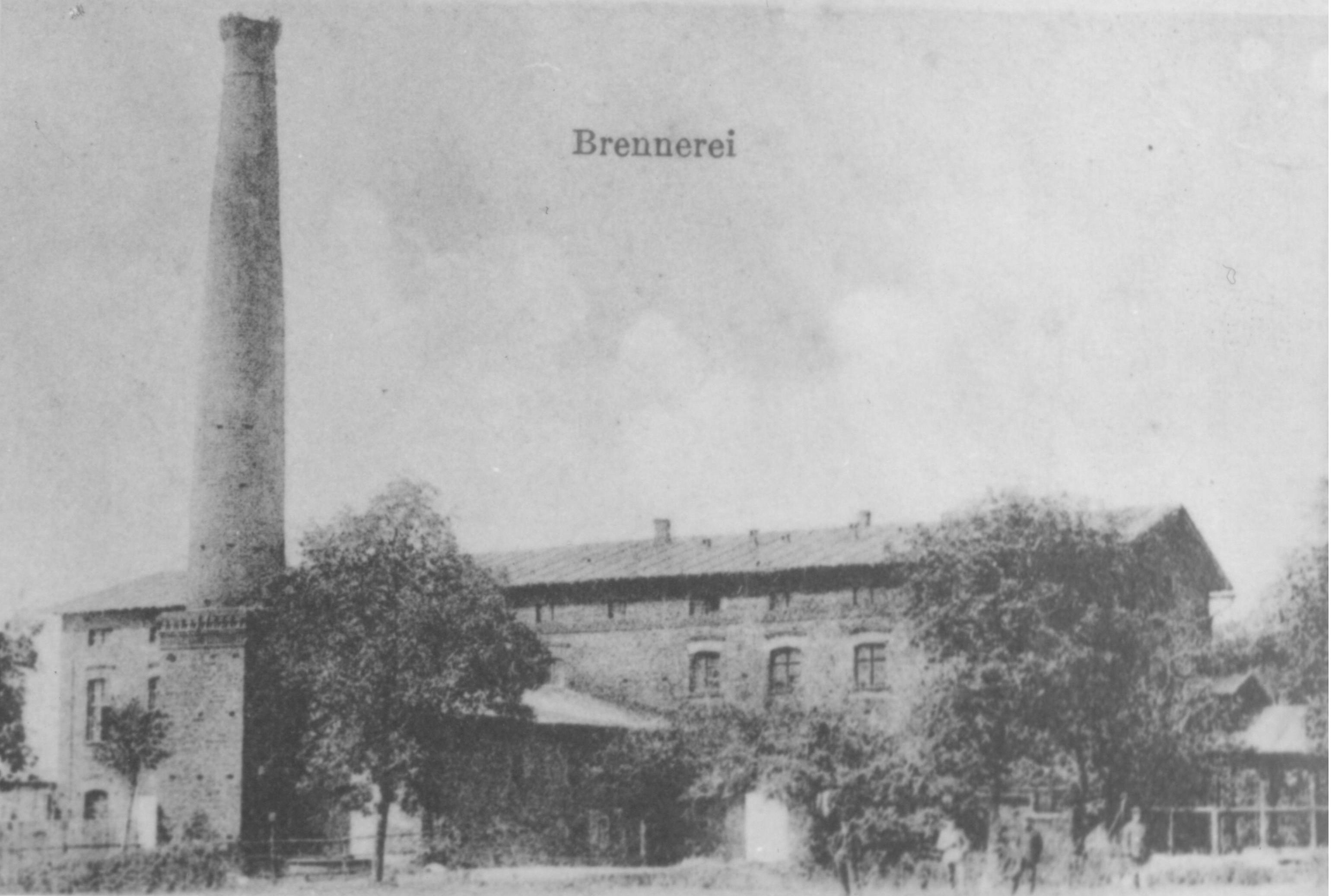 Nieistniejąca gorzelnia, (skan zdjęcia tradycyjnego z akcji zbierania starych fotografii w Kłodzie)